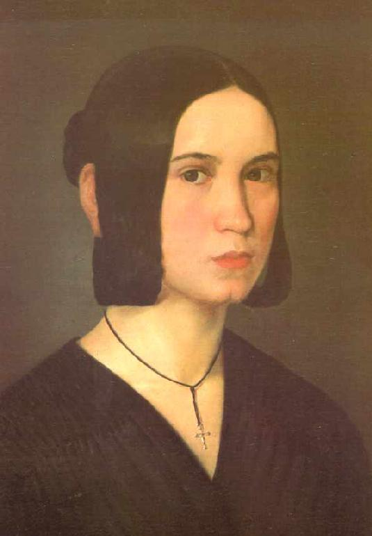 Autoportret Mine Karadžić (1828-1894)